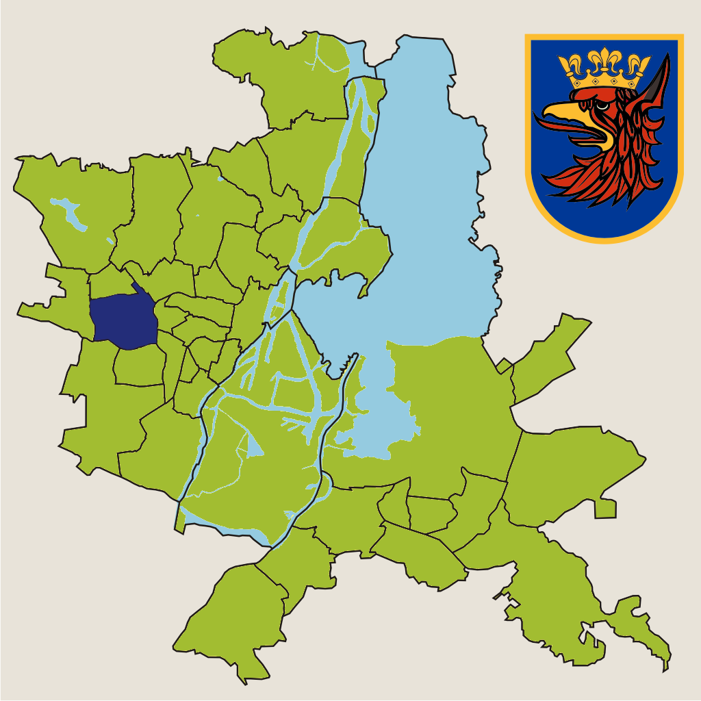 Osiedle "Pogodno" w Szczecinie – jednostka pomocnicza miasta w 2010